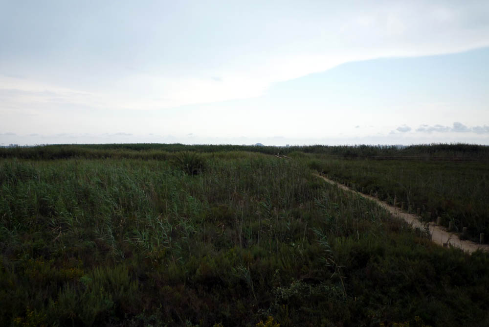 Playa de La Hita en Los Alcázares (Región de Murcia). Espacio protegido dentro del parque natural de "Islas y espacios abiertos del Mar Menor".